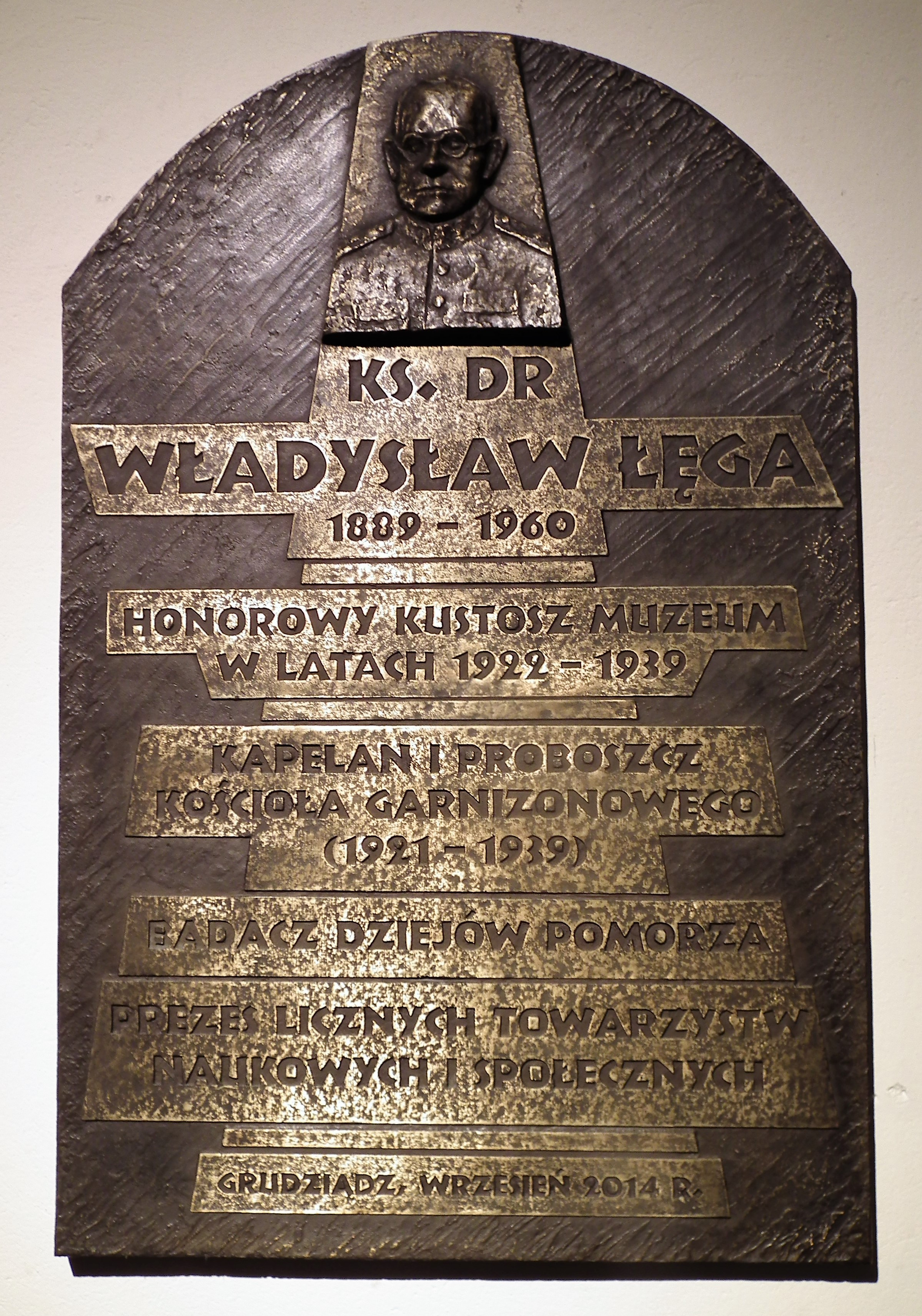 Tablica w Muzeum w Grudziądzu ku czci Władysława Łęgi.